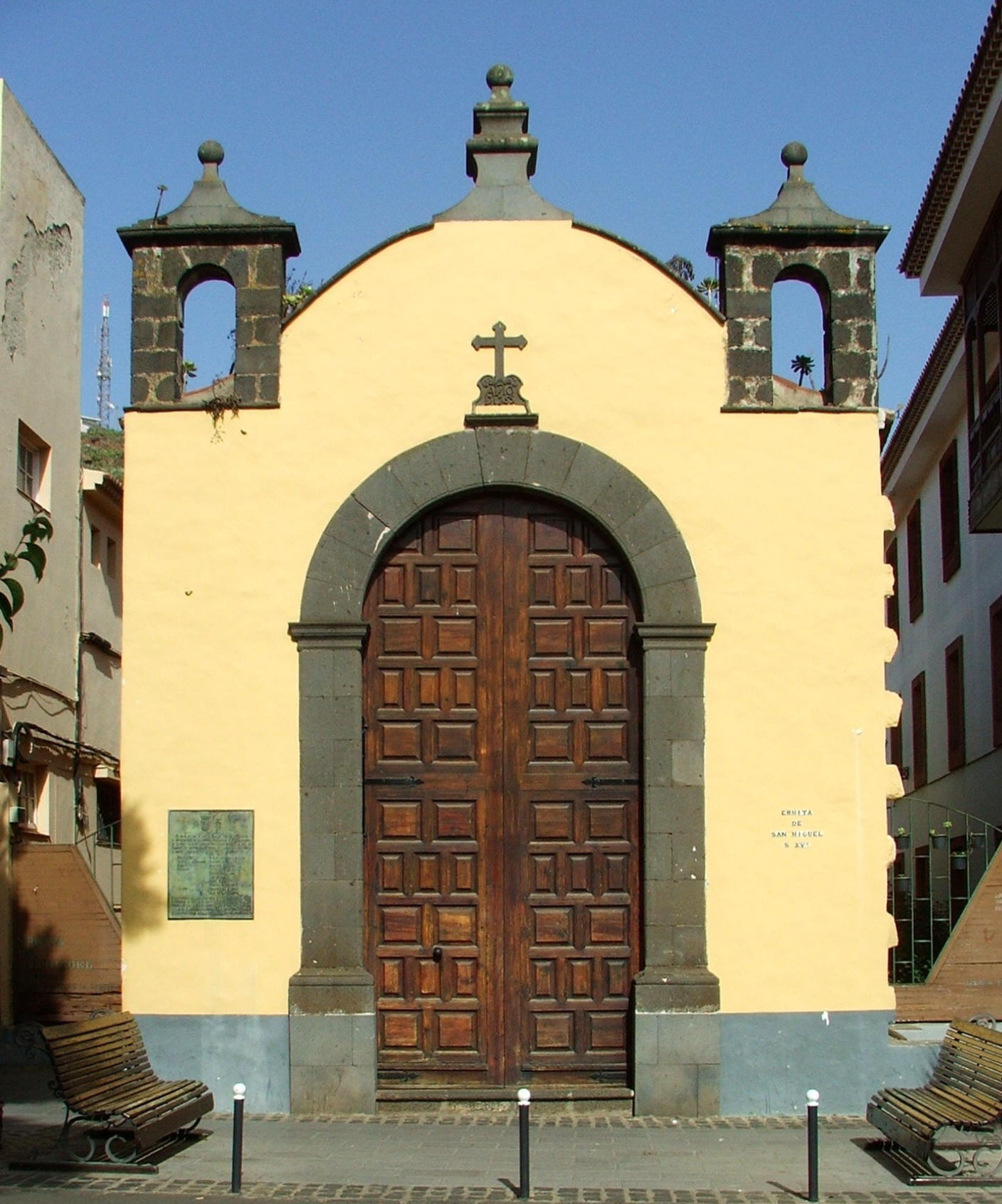 Ermita San Miguel La Laguna